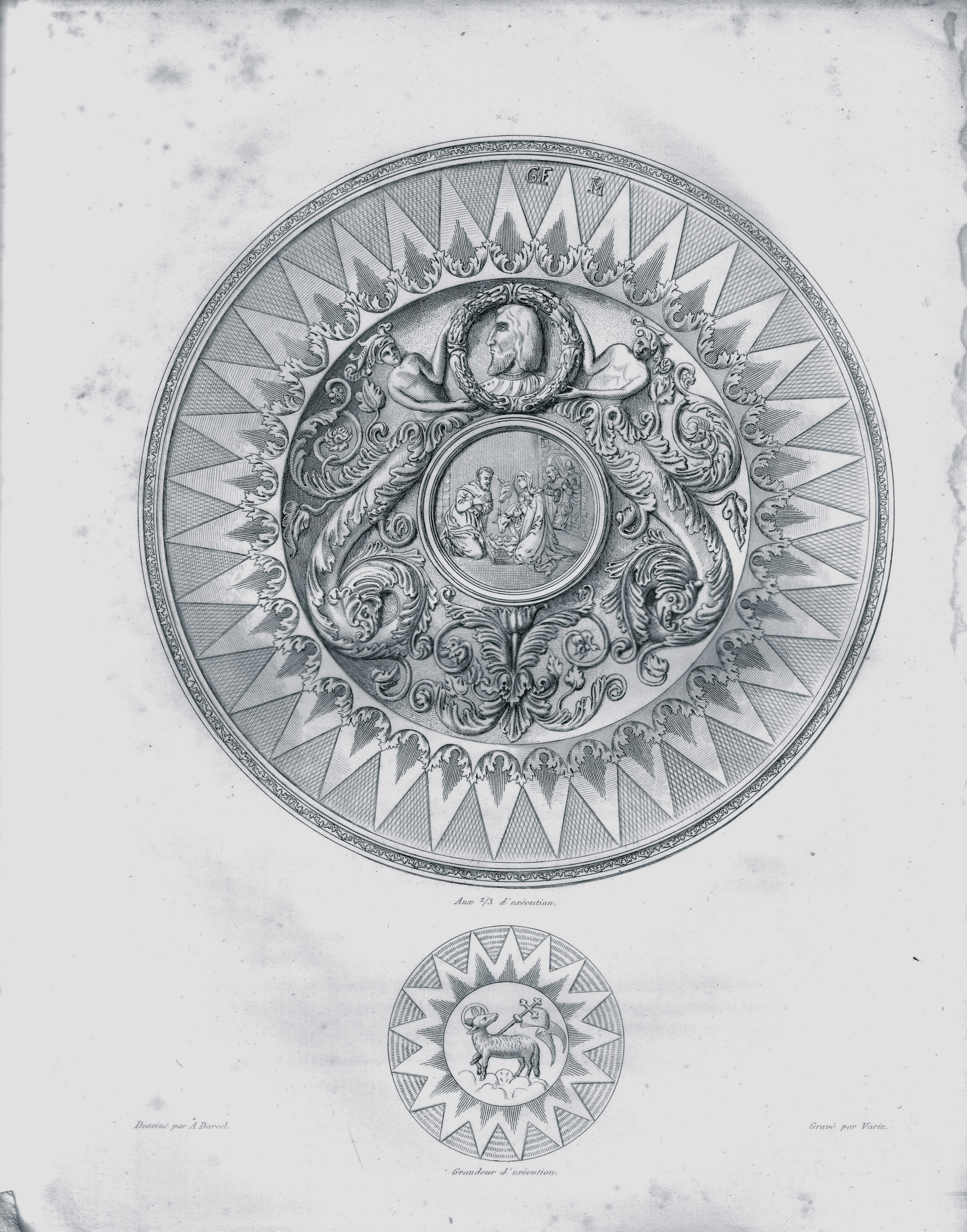 Dessin effectué en 1860 par A.Darcel, gravé par A.Varin.